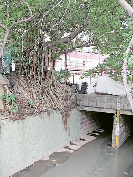 中文（香港）: 花墟道明渠口